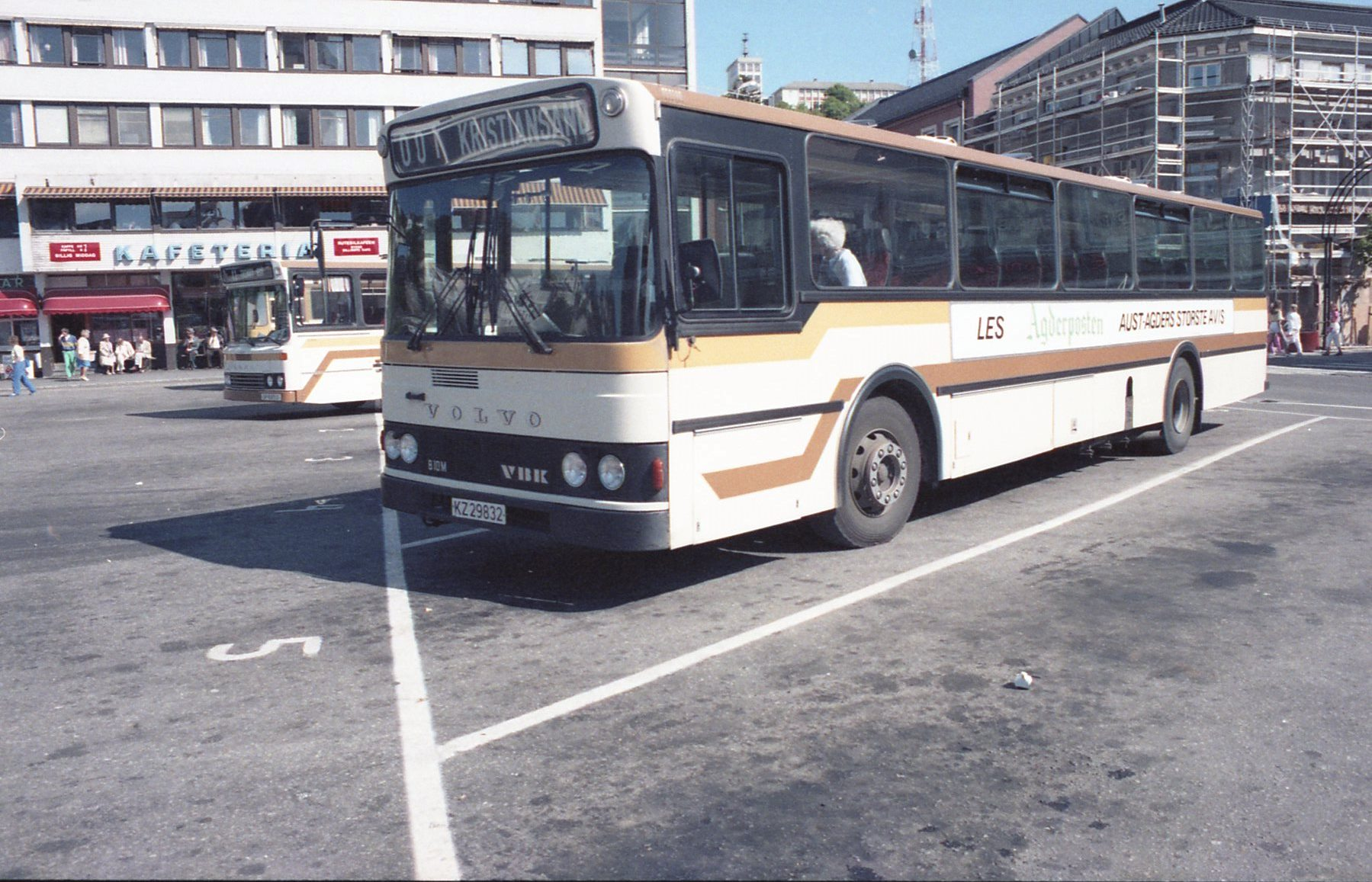 Buss fra ADS ventende på Arendal rutebilstasjon i 1983.